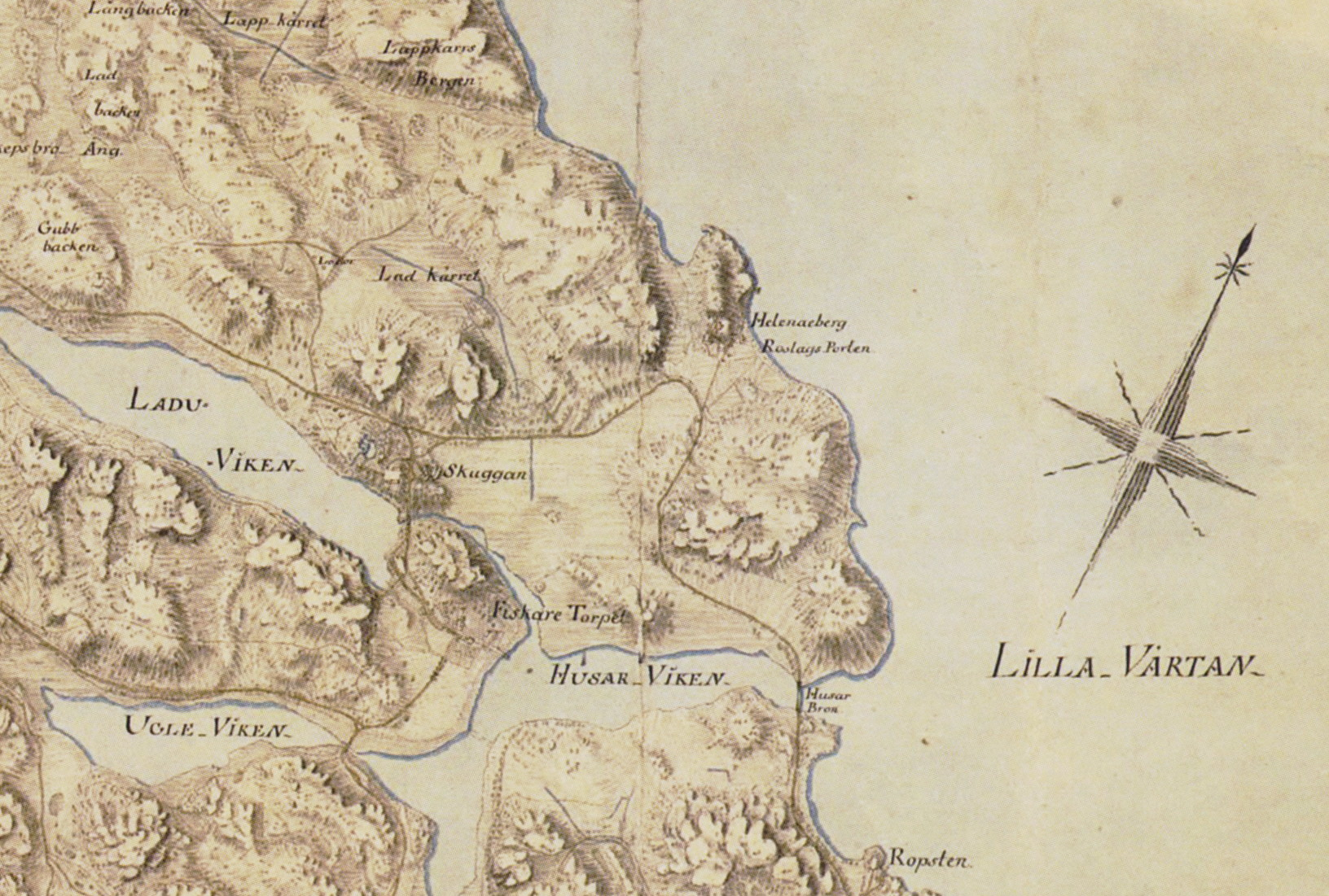 "Ladugårds Gärdet och Djurgården med däromkringliggande Situationer" (norra del) med Skuggan och Heleneberg